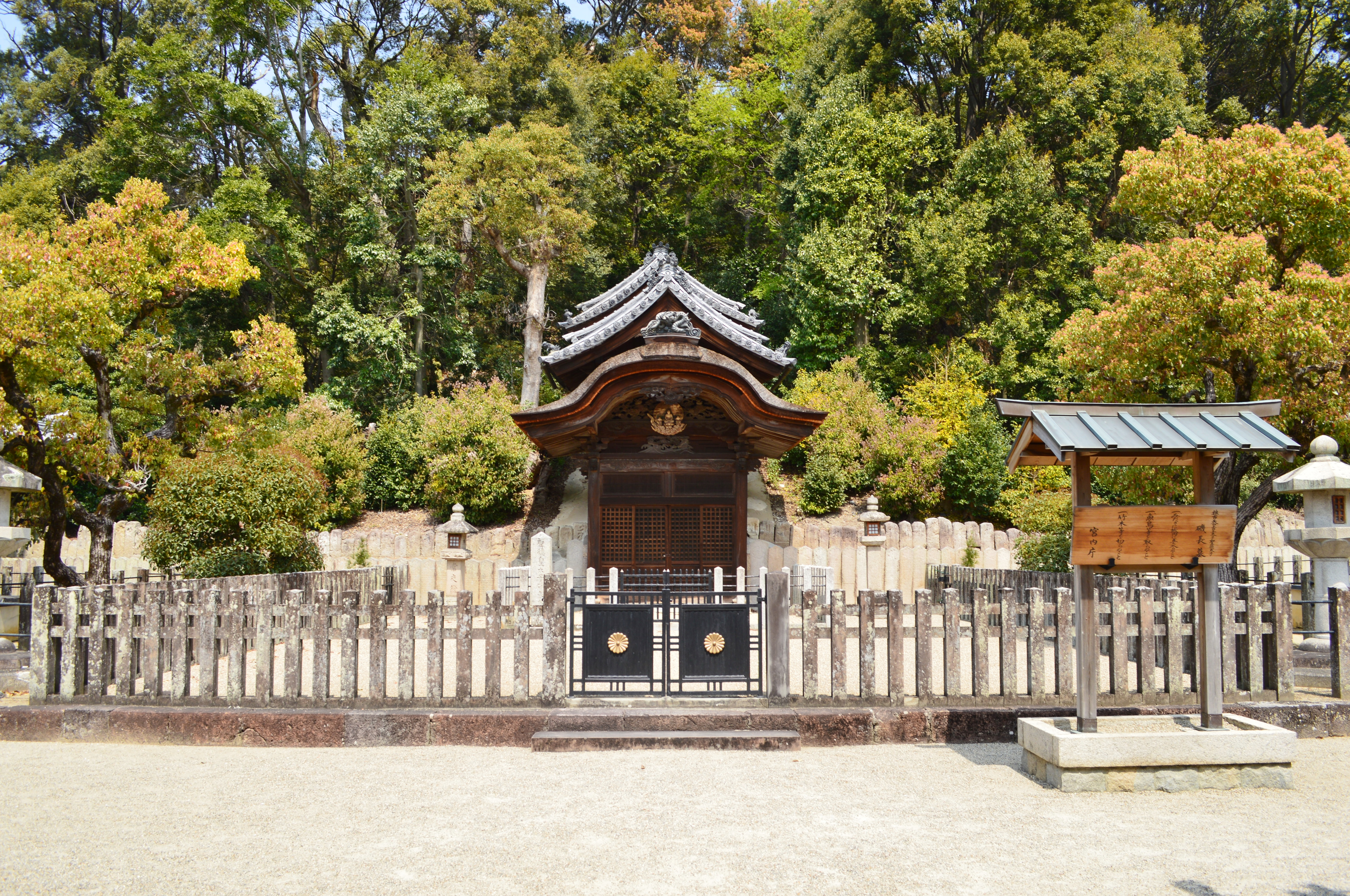 聖徳太子磯長墓 拝所 Nikon D3200